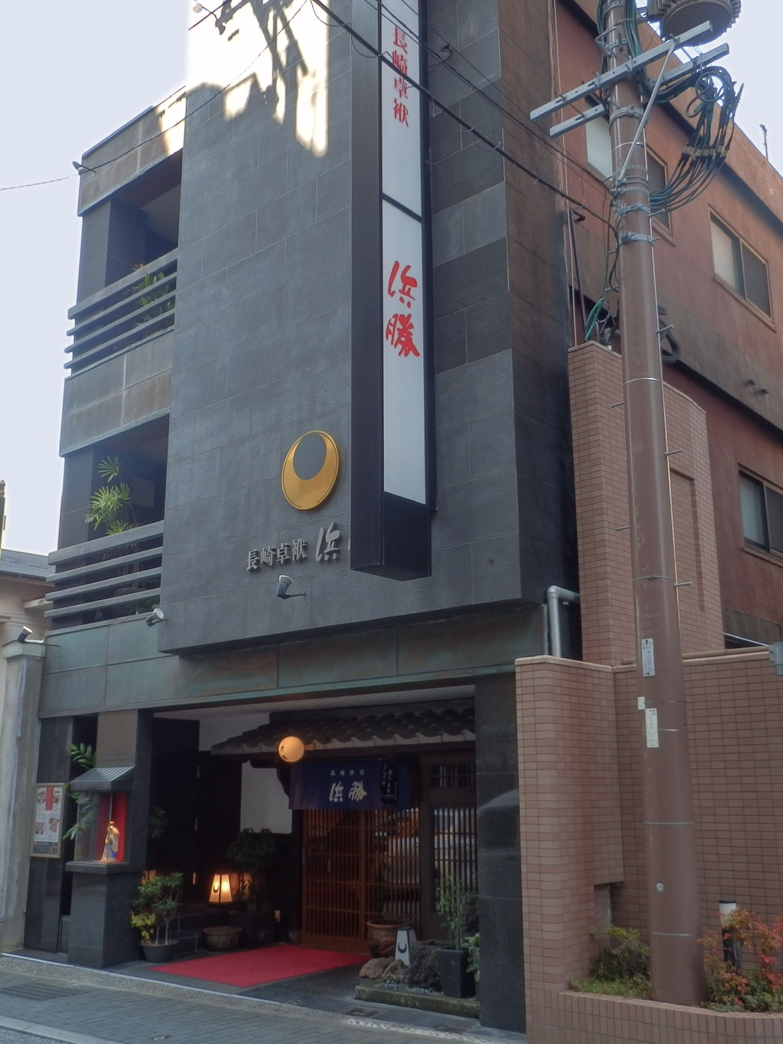 長崎卓袱 浜勝（登記上の本店）